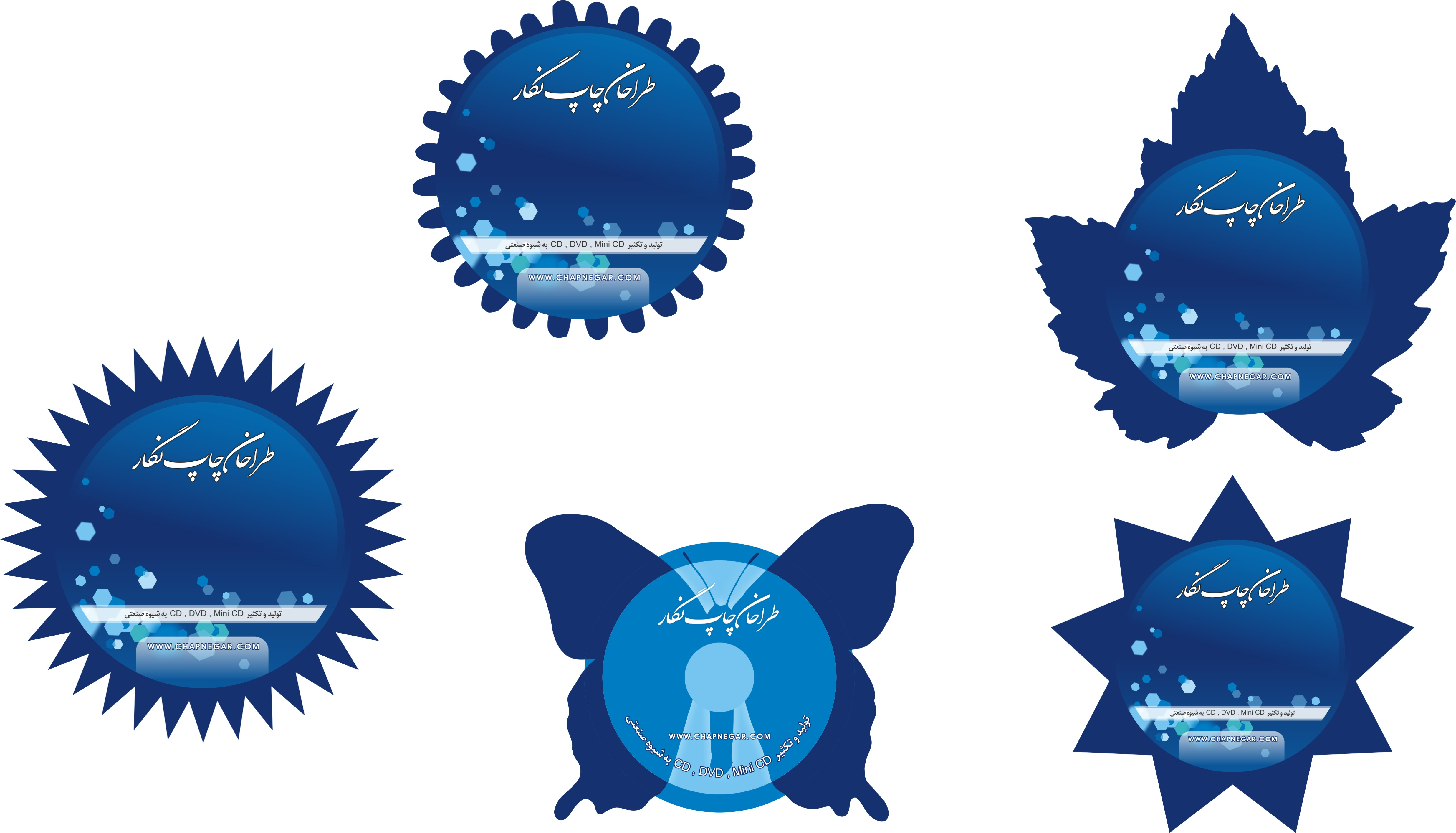 تولید این سی دی ها با توجه به رشد صنعت چاپ سی دی در این مجموعه قابل ارایه می باشد